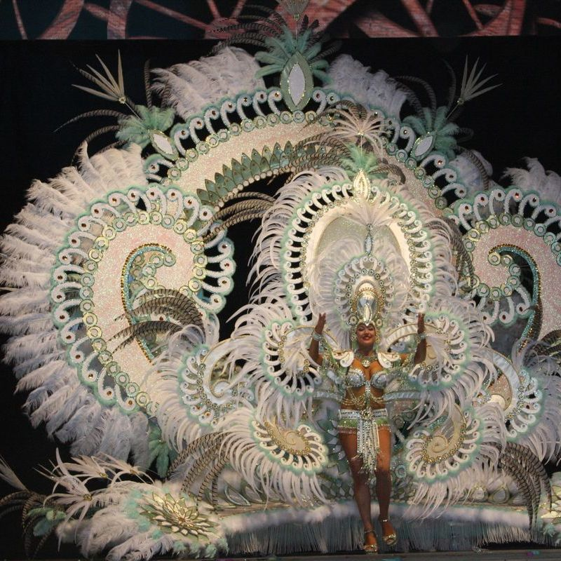 Una reina del Carnaval de Vinaròs 2015, en el desfile.